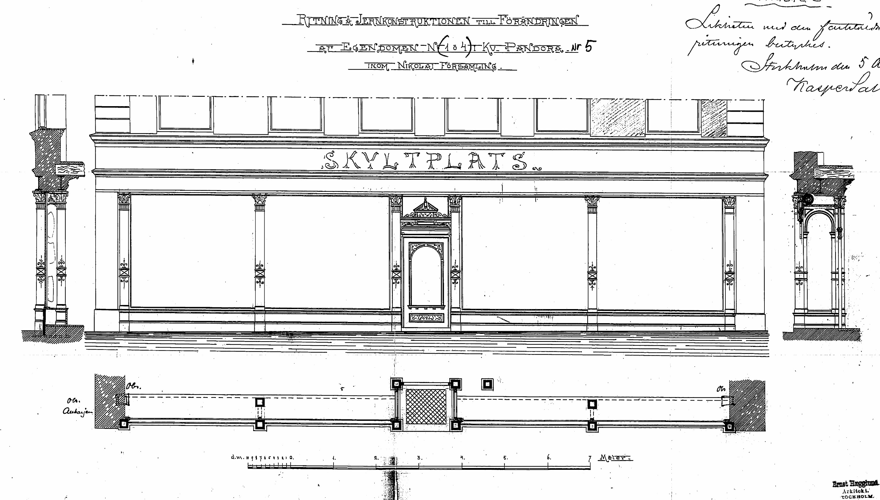 Västerlånggatan 38, fasadritning